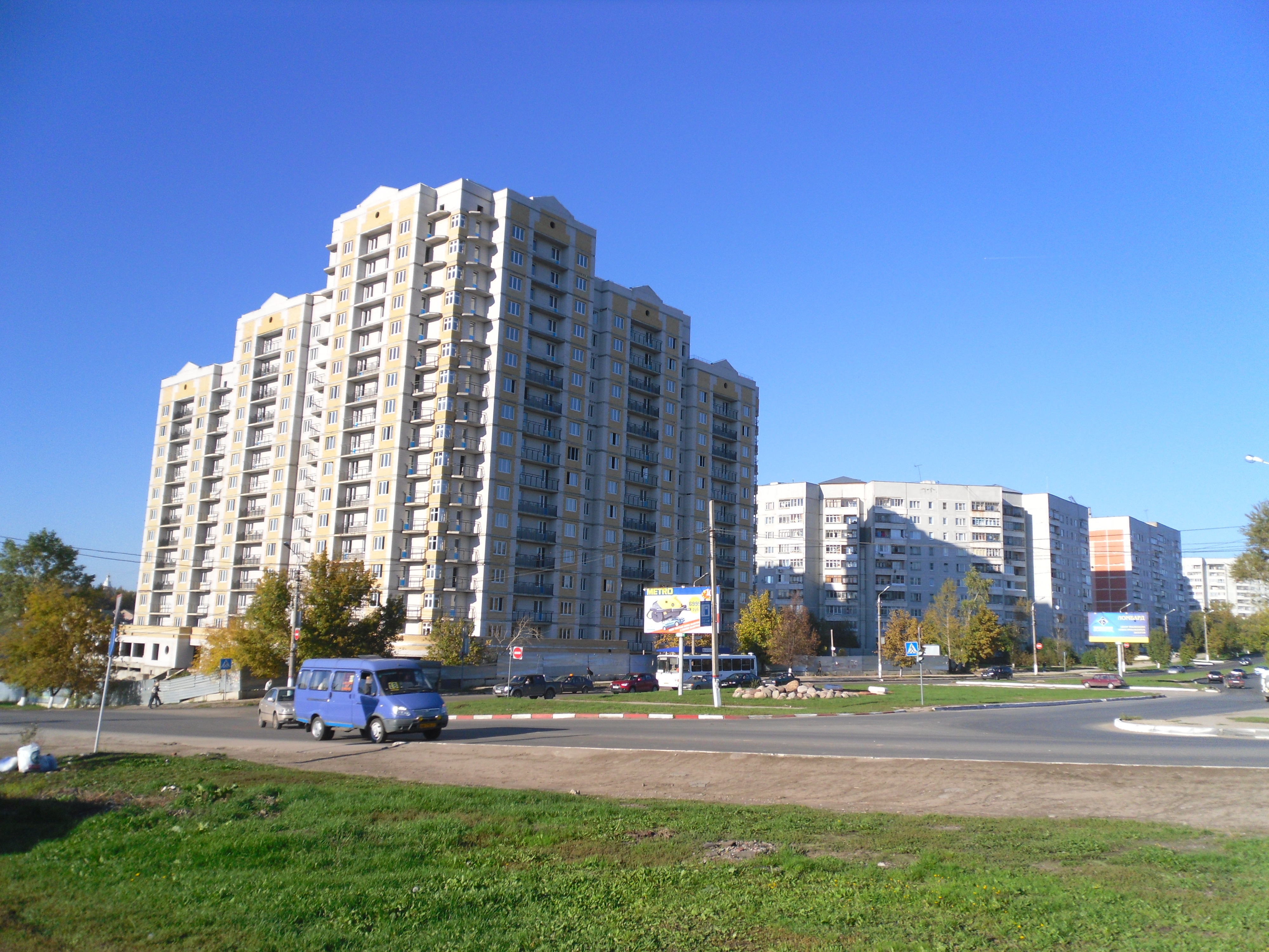 Тула. Микрорайон им. Вильямса.